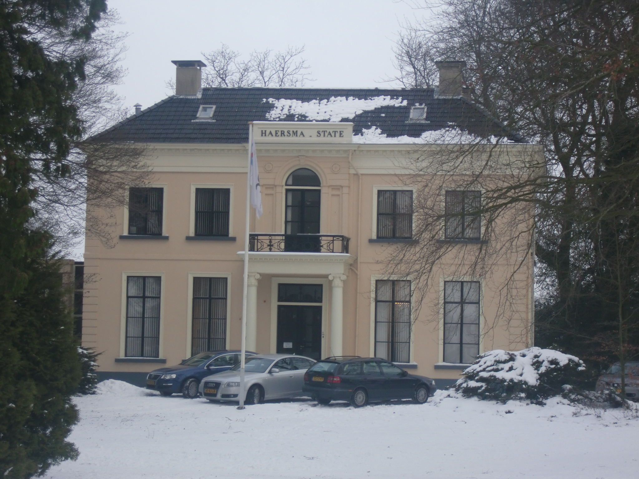 Voorzijde Haersma State.